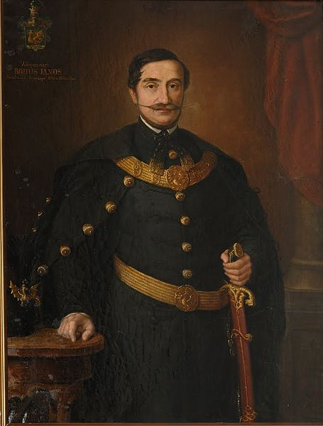 báró világosvári Bohus János főispán, országgyűlési követ.